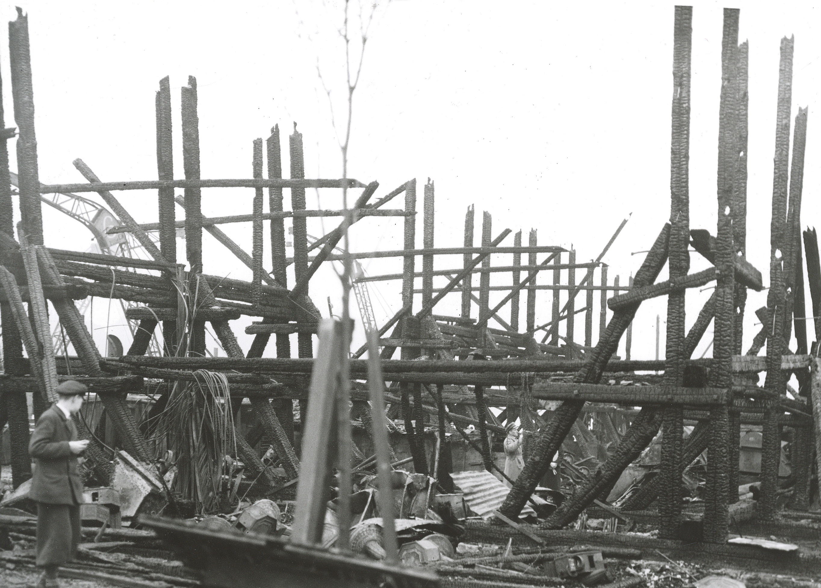 Branden på Gröna Lund 22 mars 1935